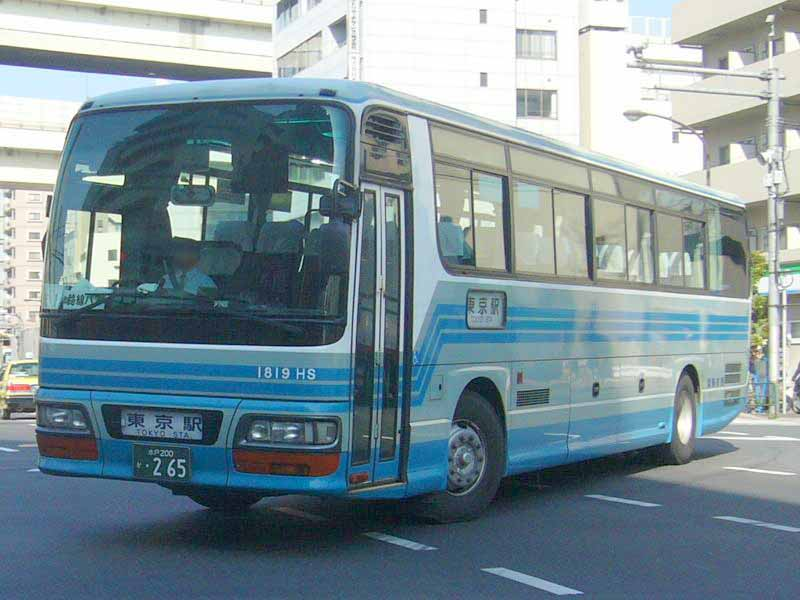 登録番号：水戸200か・265 関東鉄道波崎営業所所属 はさき号用 いすゞ・ガーラ KL-LV781R2